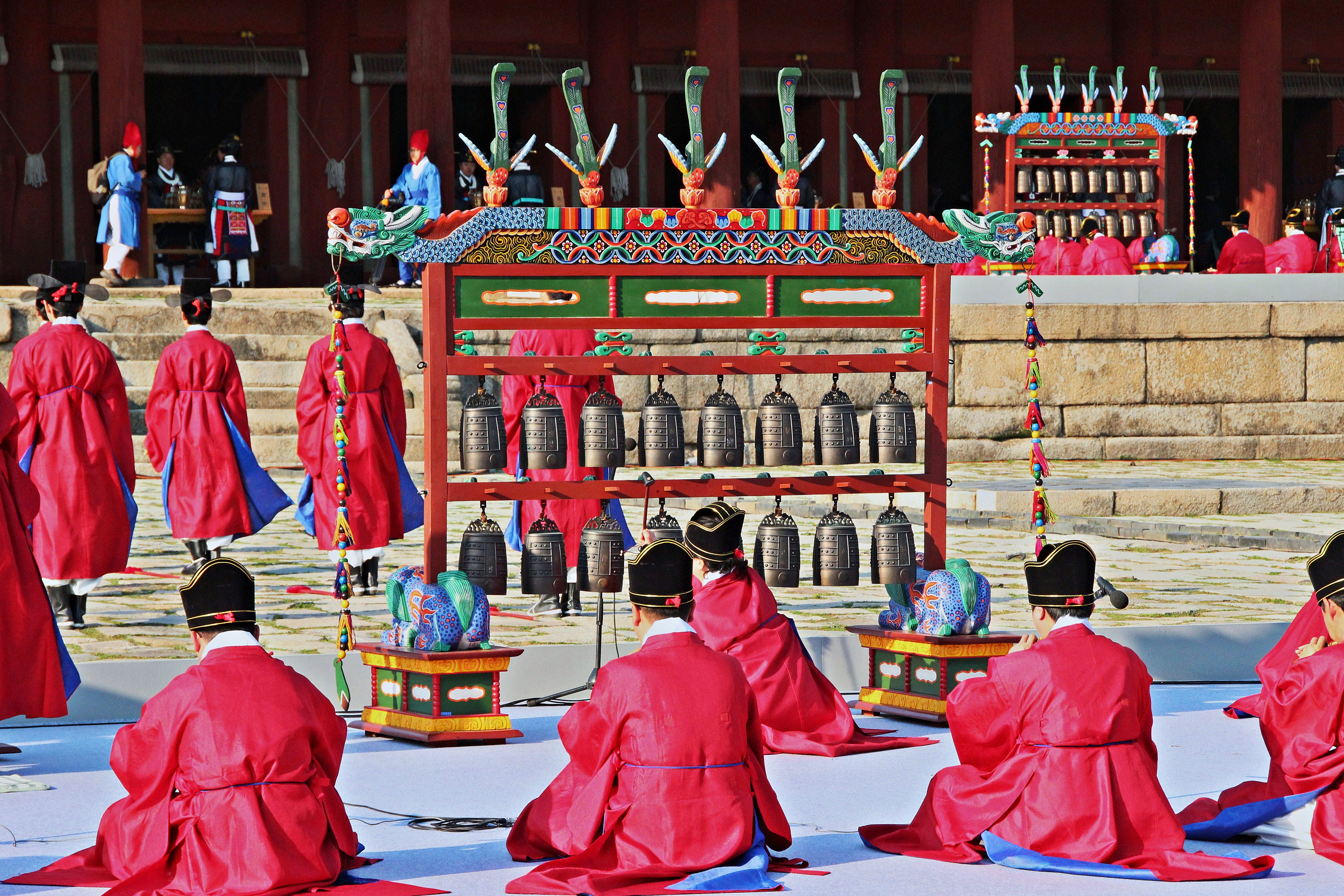 Other ingredients usually added when the ancestral rites at Jongmyo royal shrine: ancestral rites music, singing, dancing and instrumental music.